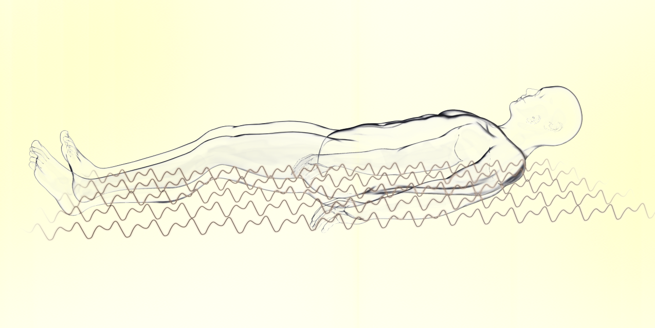 Toepassing van andullatietherapie - werkzame frequenties die door het lichaam stromen.